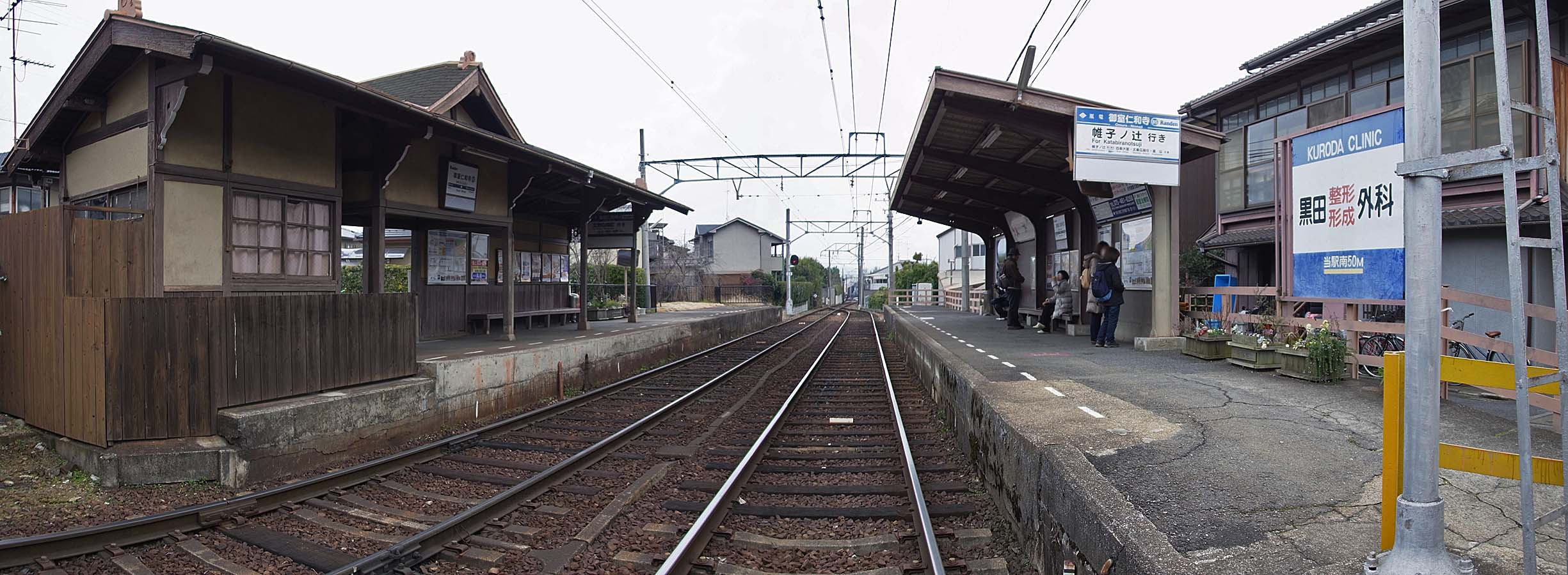 Omuro Ninna-ji st. , 御室仁和寺駅